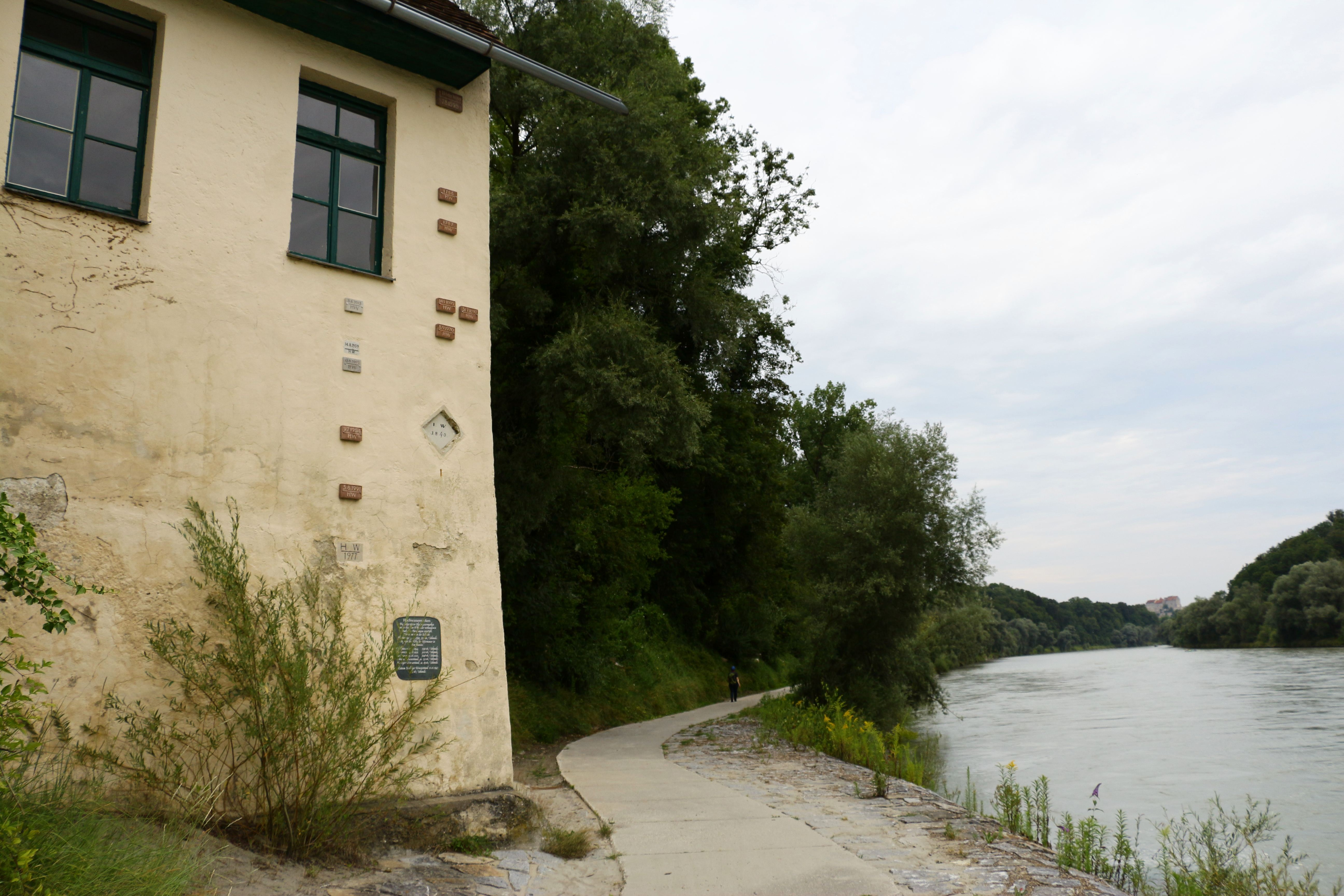 Hochwassermarken der Salzachüberschwennungen an einem Gebäude in Burghausen